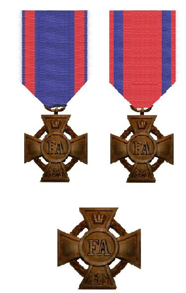 Oldenburgse kruisen uit de Eerste Wereldoorlog. Ie en IIe Klasse en aan het rode lint voor non-combattanten.